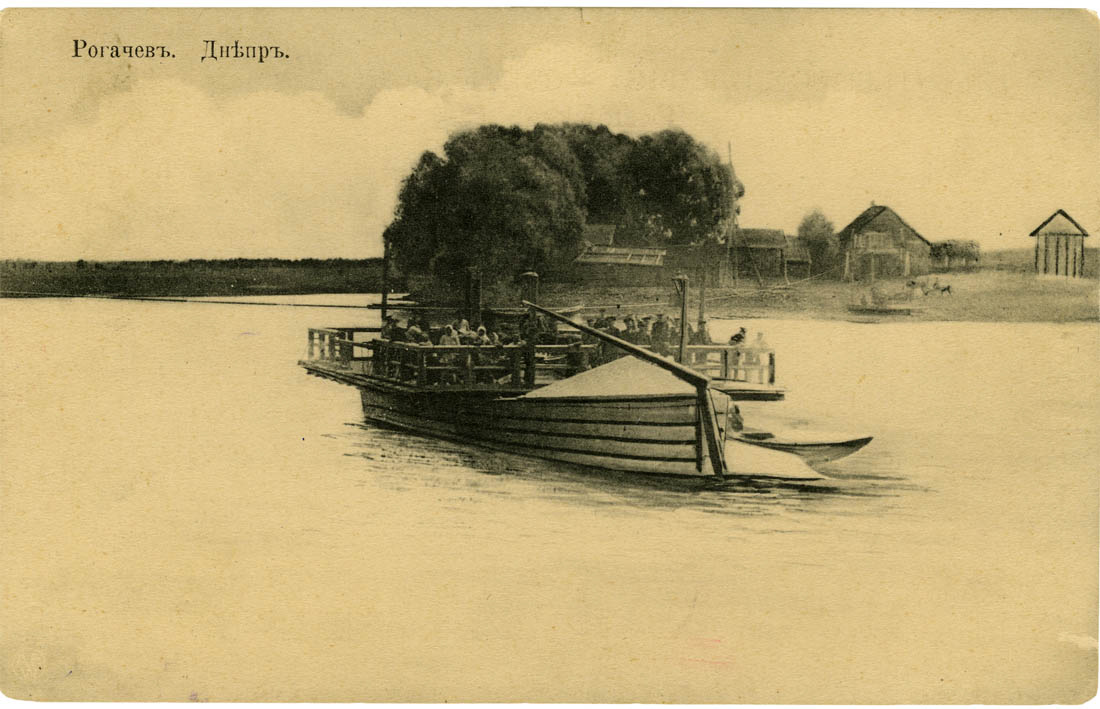 Беларуская (тарашкевіца): Рагачоў (Rahačoŭ), рака Дняпро (Dniapro)